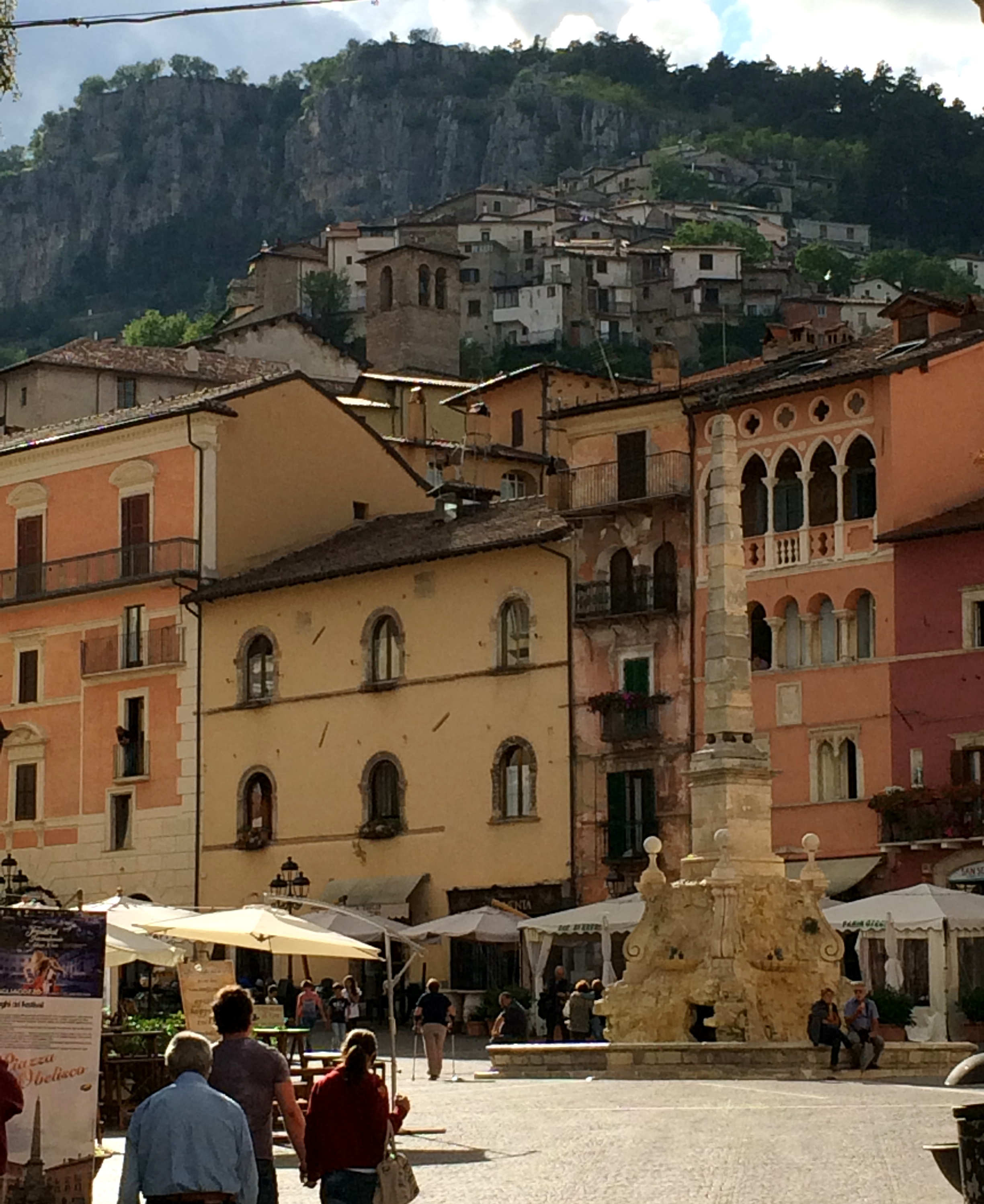 Piazza Obelisco a Tagliacozzo (AQ)